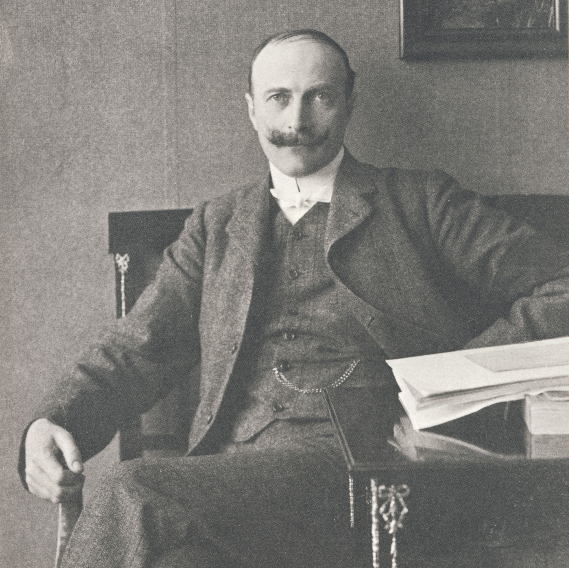 Fotografen Ernest Florman